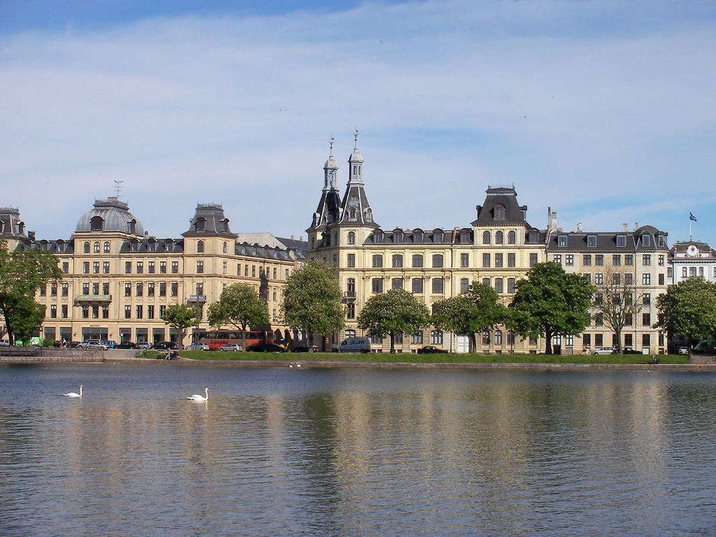 Søtorvet in Copenhagen, Denmark